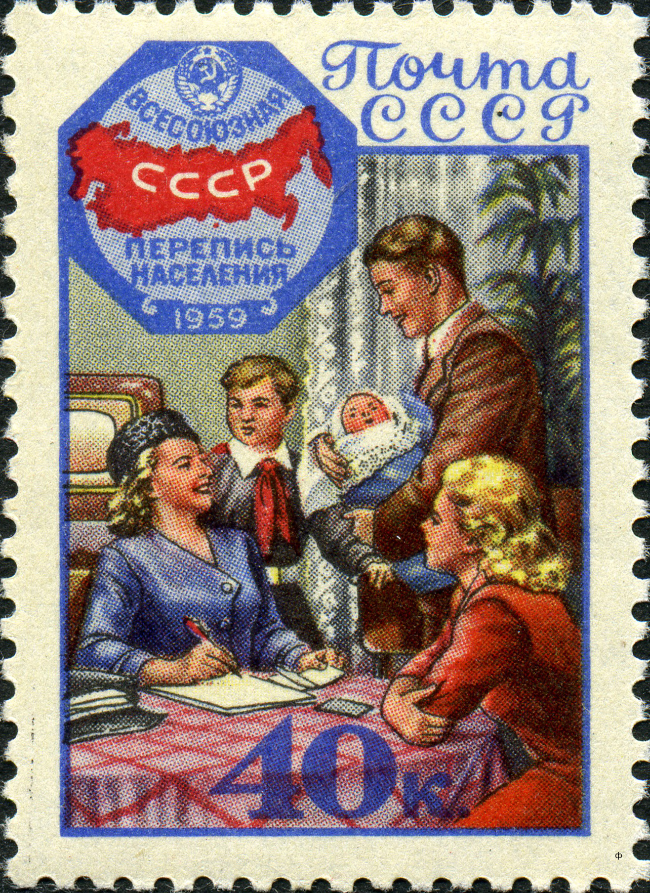 Марка СССР